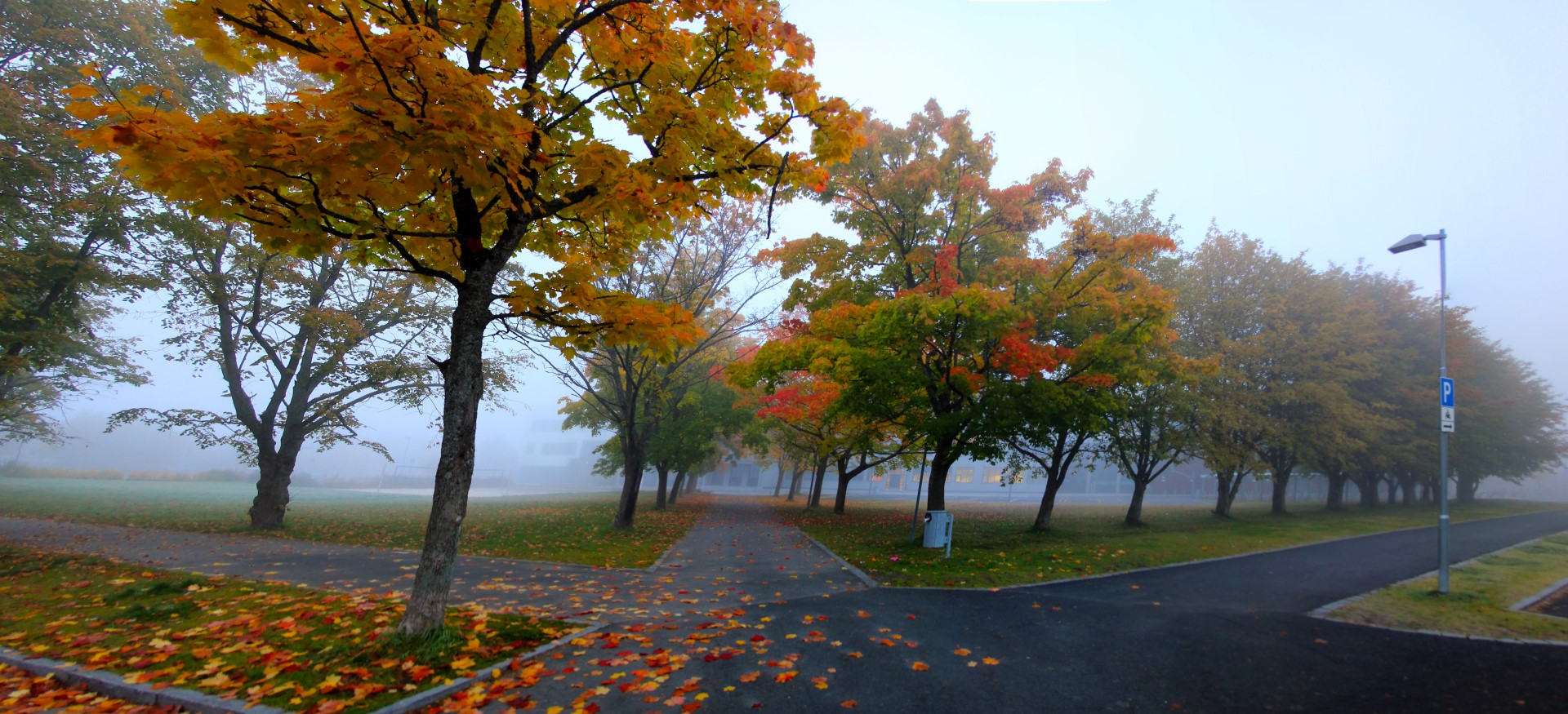 Høststemning på Strinda